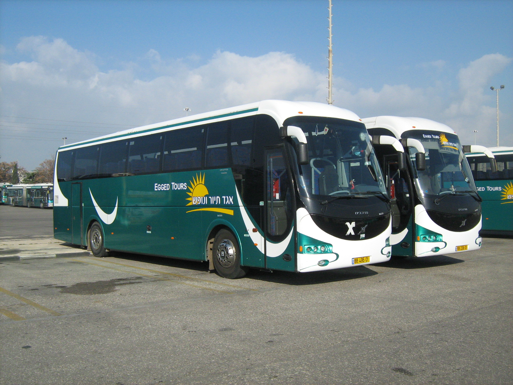 חניון אגד בחולון